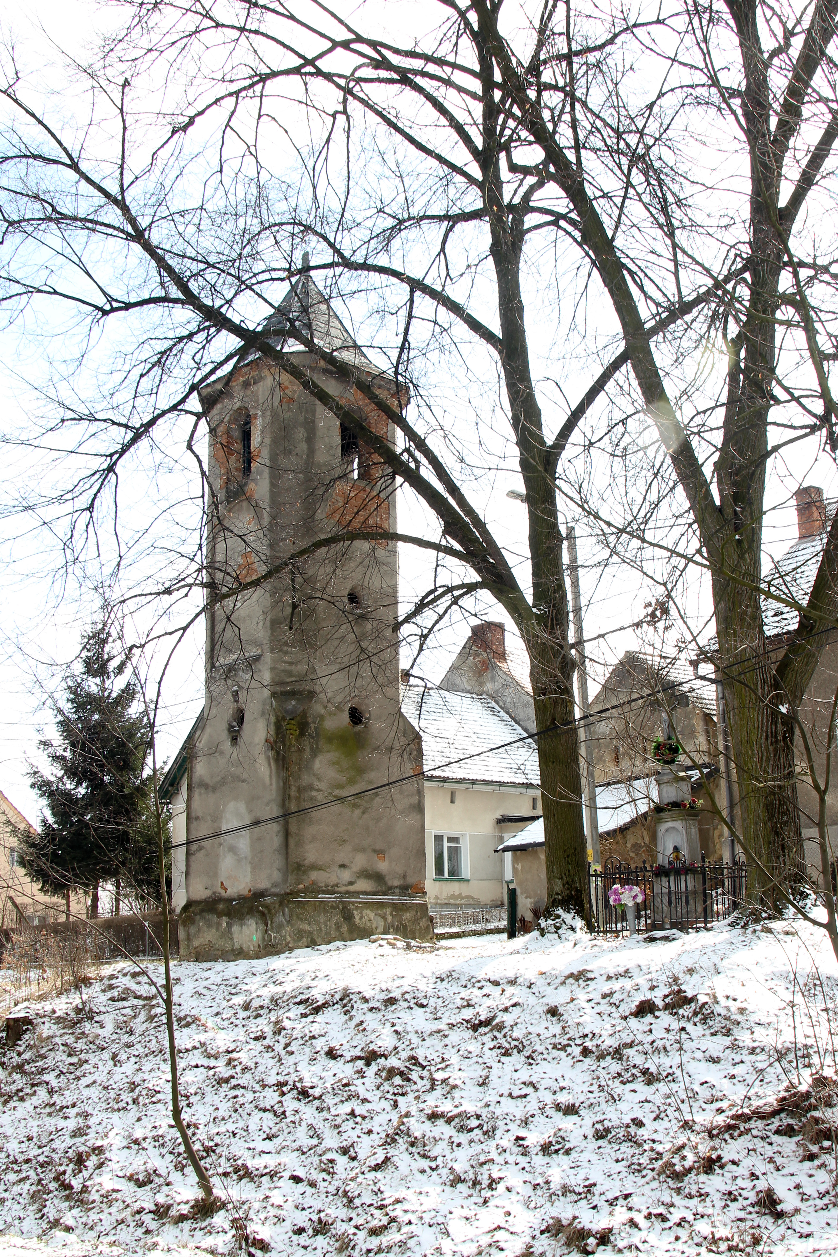 Dzwonnica (z 1878?) w Markowicach – wieś w Polsce, w województwie opolskim, w powiecie nyskim, w gminie Głuchołazy.